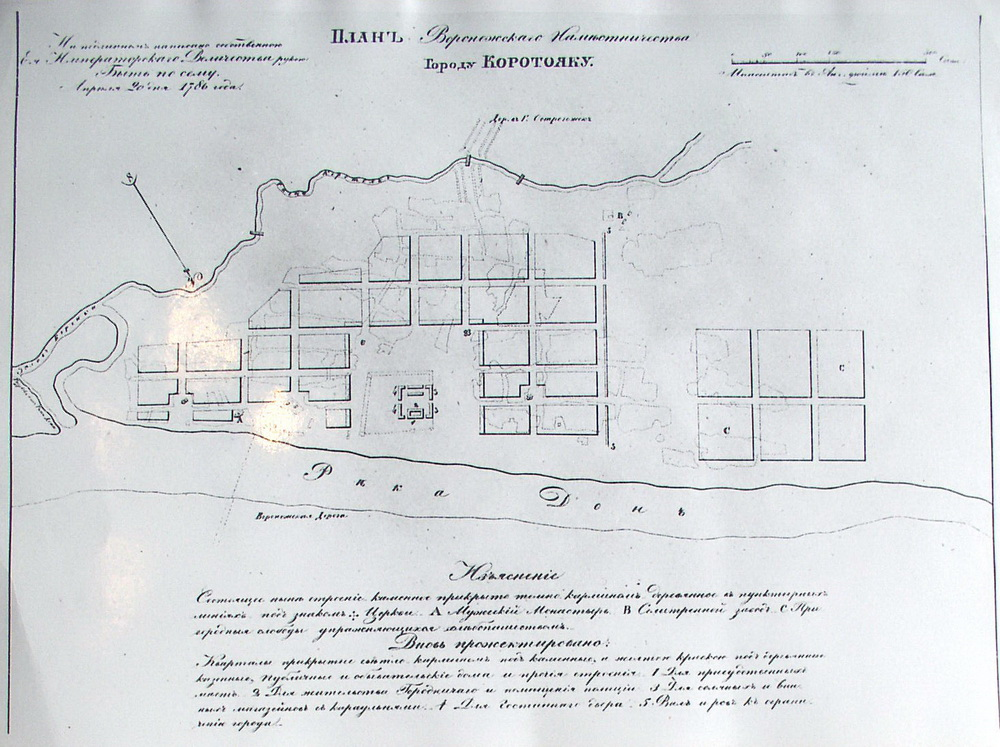 подробный план города Коротояк.